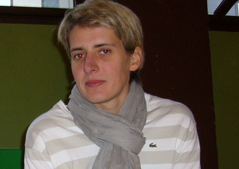 Photo de la joueuse française de basket-ball Cathy Melain. The french basketball player Cathy Melain.